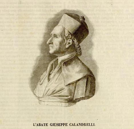 Ritratto di Giuseppe Calandrelli (1749-1827)